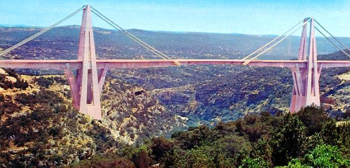 Wadi el Kuf cable stayed bridge (Jebel Akhdar , Libya)